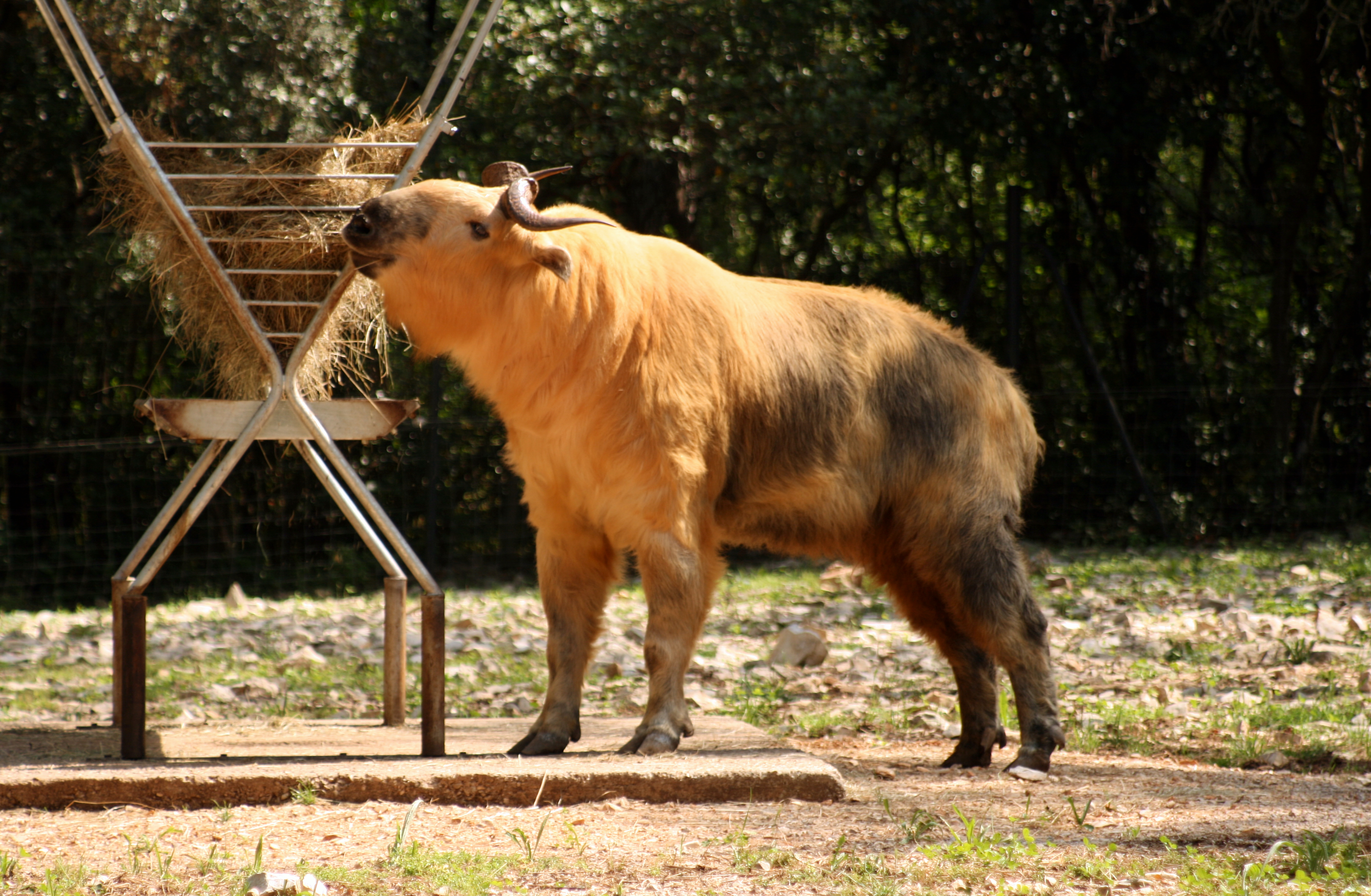 Titre :Le Takin du Tibet Description :Le Takin du Tibet Date :Juin 2007 Auteur : Xavier Malafosse - Utilisateur:Simio - User:Simio - Simio Sapiens sur Flickr Licence